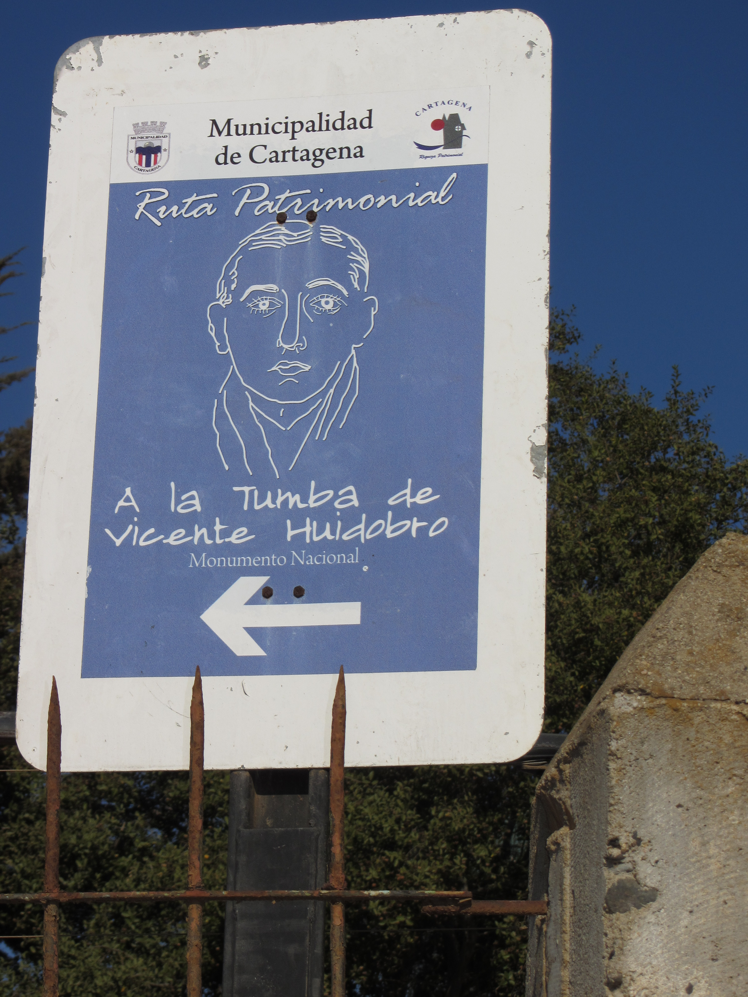 Señalización en el camino hacia la Casa Museo y tumba del poeta chileno :Vicente Huidobro, en Cartagena